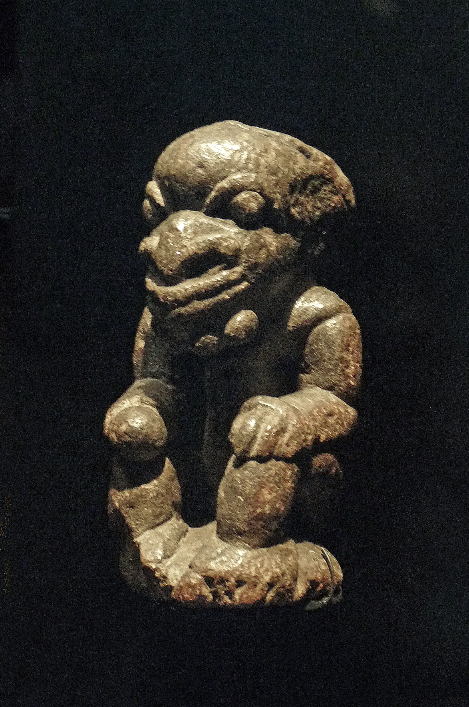 Nomoli, population Mende, Sierra Leone. Musée du quai Branly.